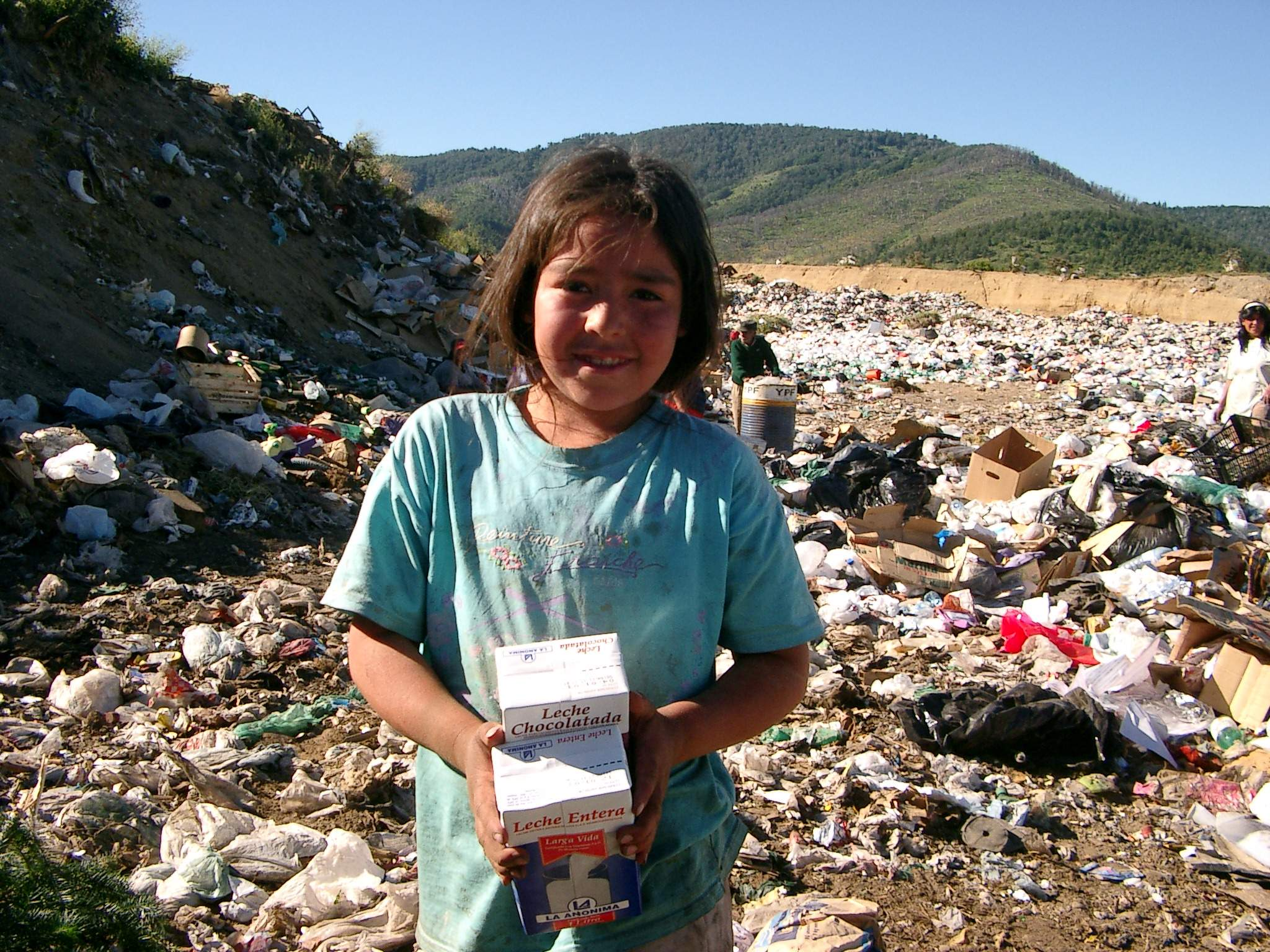 Nahrungssuche auf Müllhalden